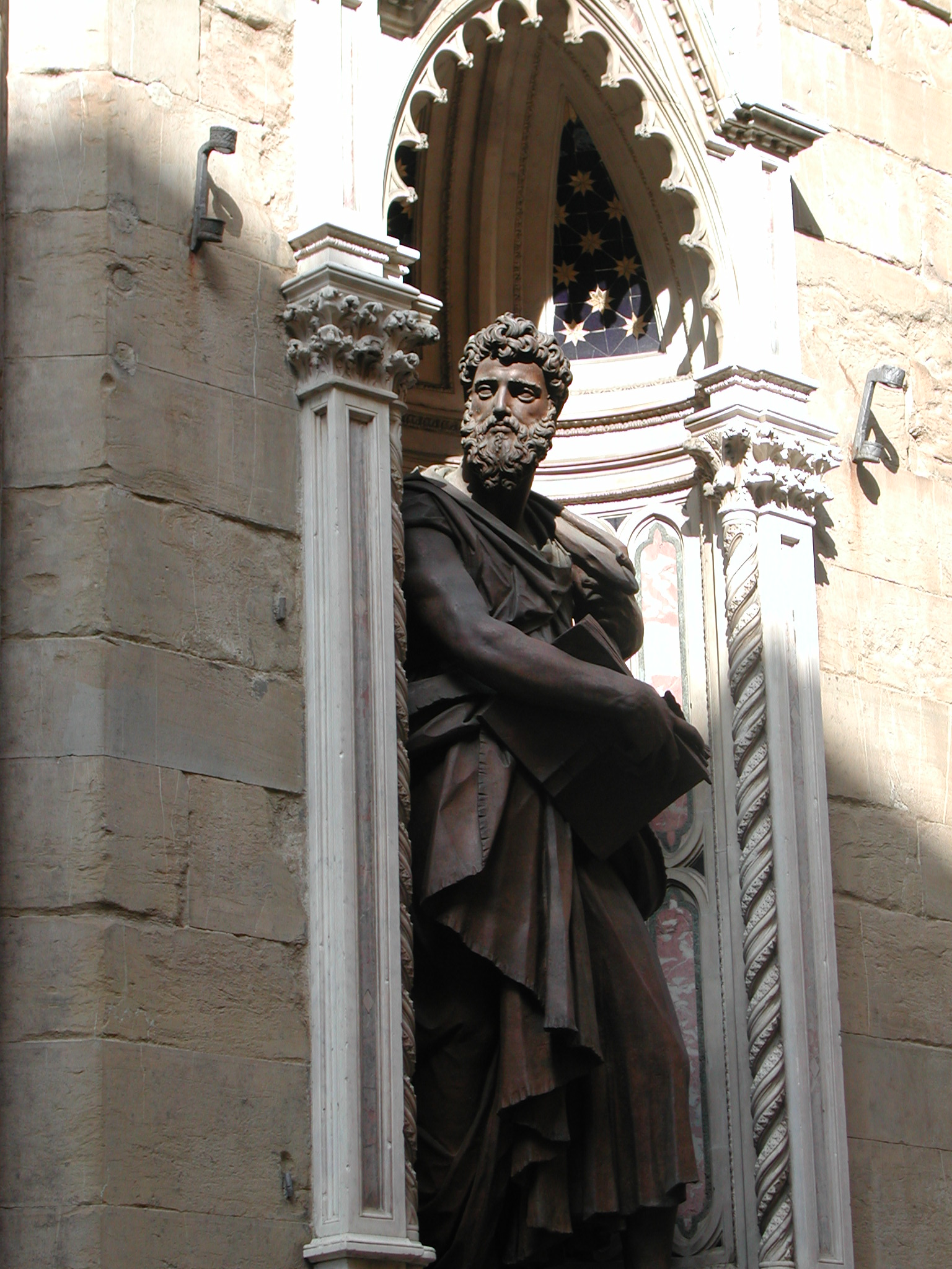 Orsanmichele, Firenze, St. Luke by Giambologna.